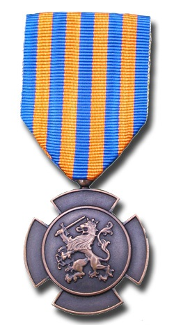 Bronzen Leeuw Rijksmunt nieuw